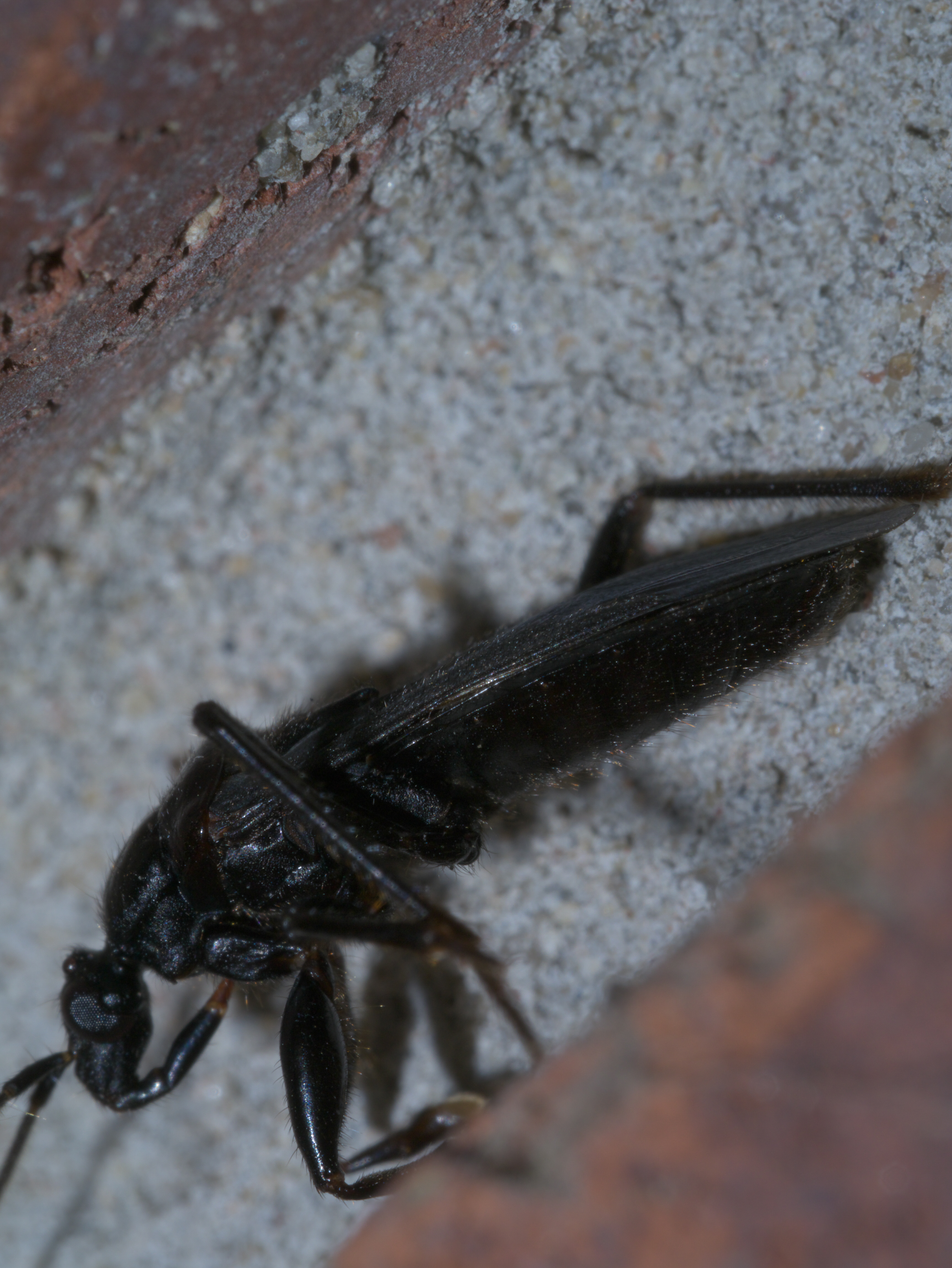 Melanolestes picipes, Black Corsair, ID Confidence: 87